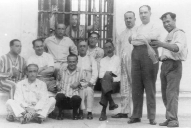 Gefangene, Villa de Cisneros